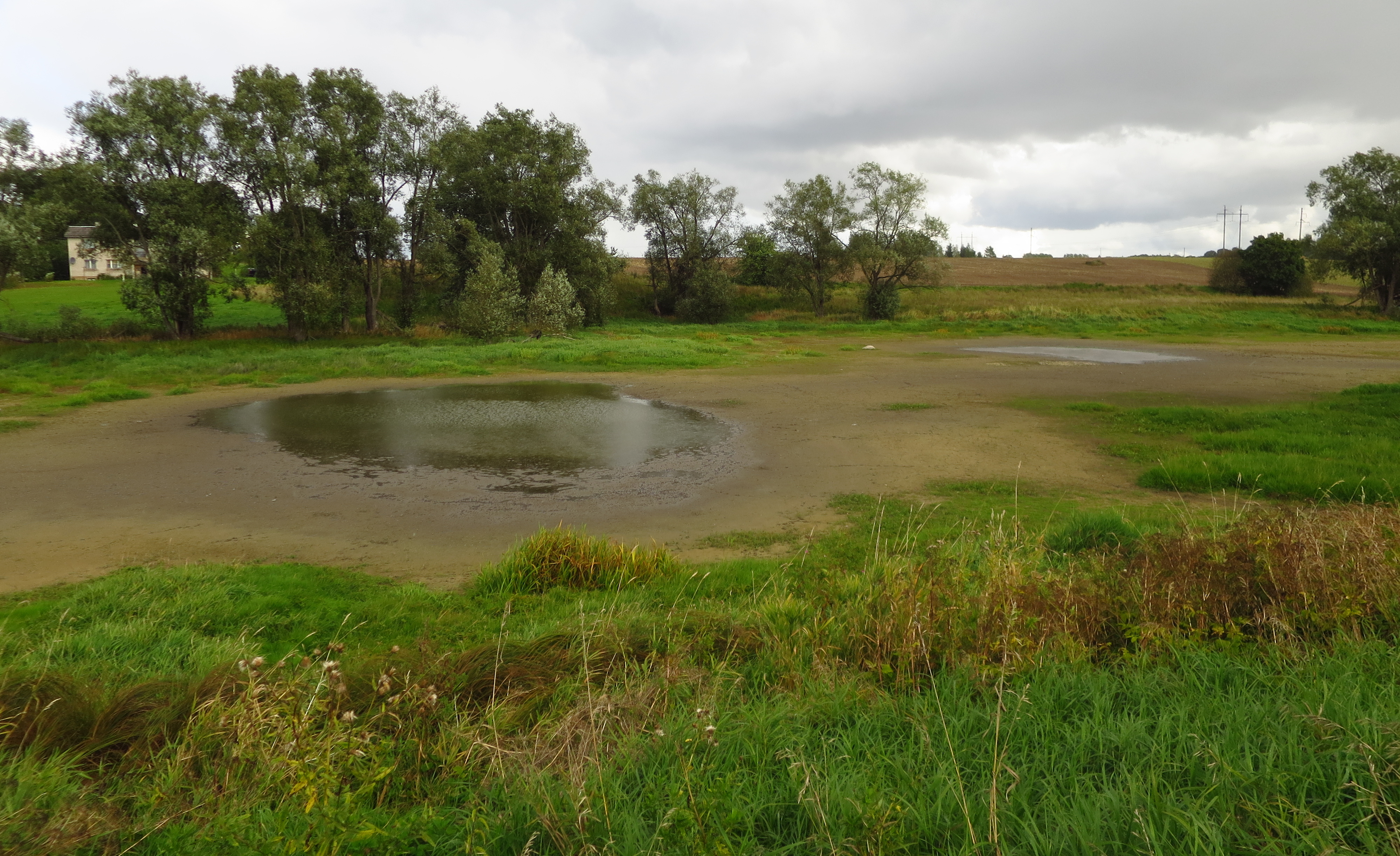 Jõepere allikad ja Jõepere järve kaguosa suvel